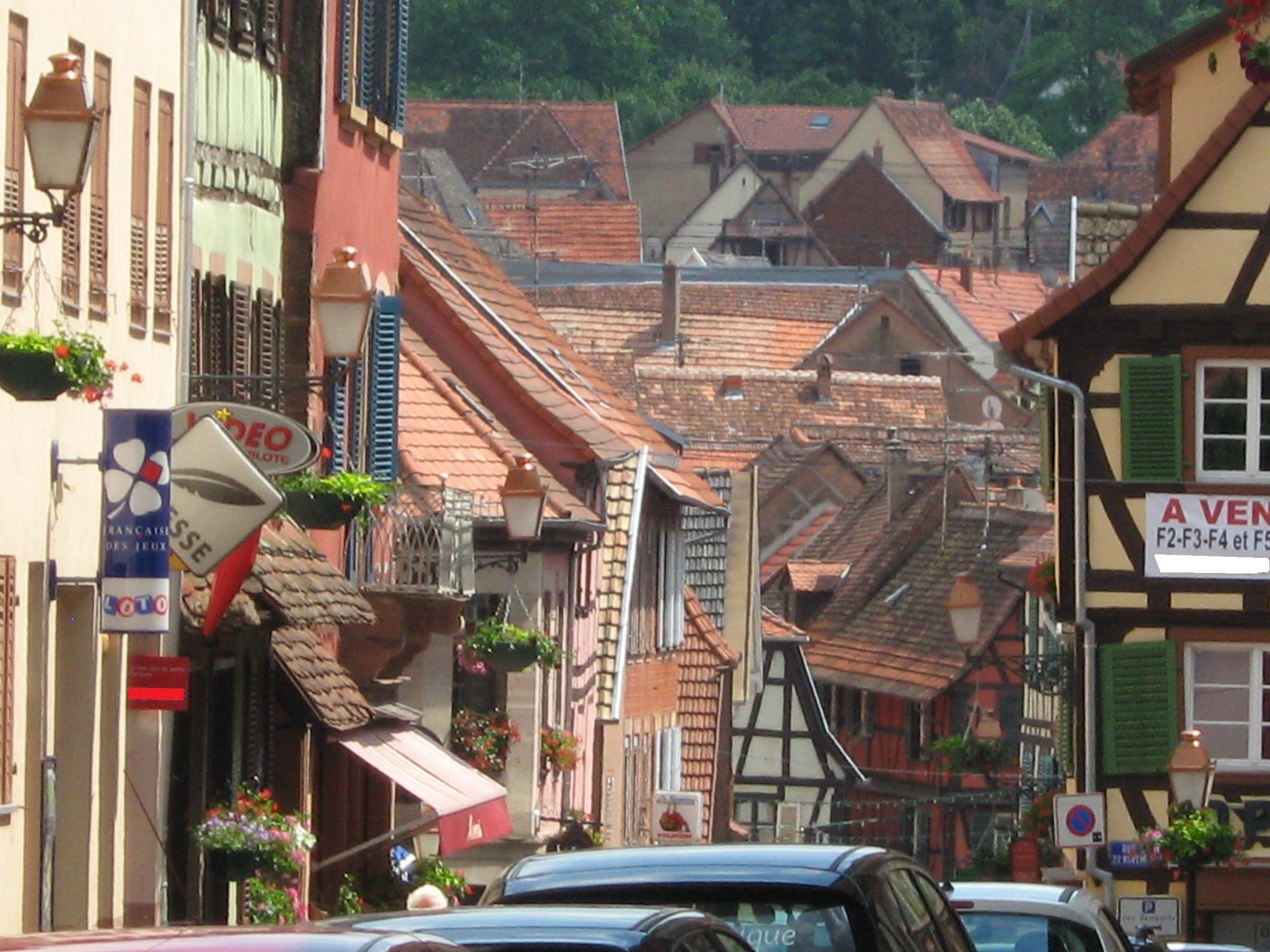 Vue sur la Grand'Rue de Bouxwiller (67) France